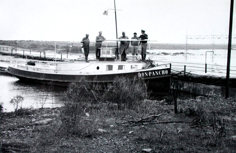 Creciente del 59 en Rincón del Bonete 1959 Remolcador Don Pancho